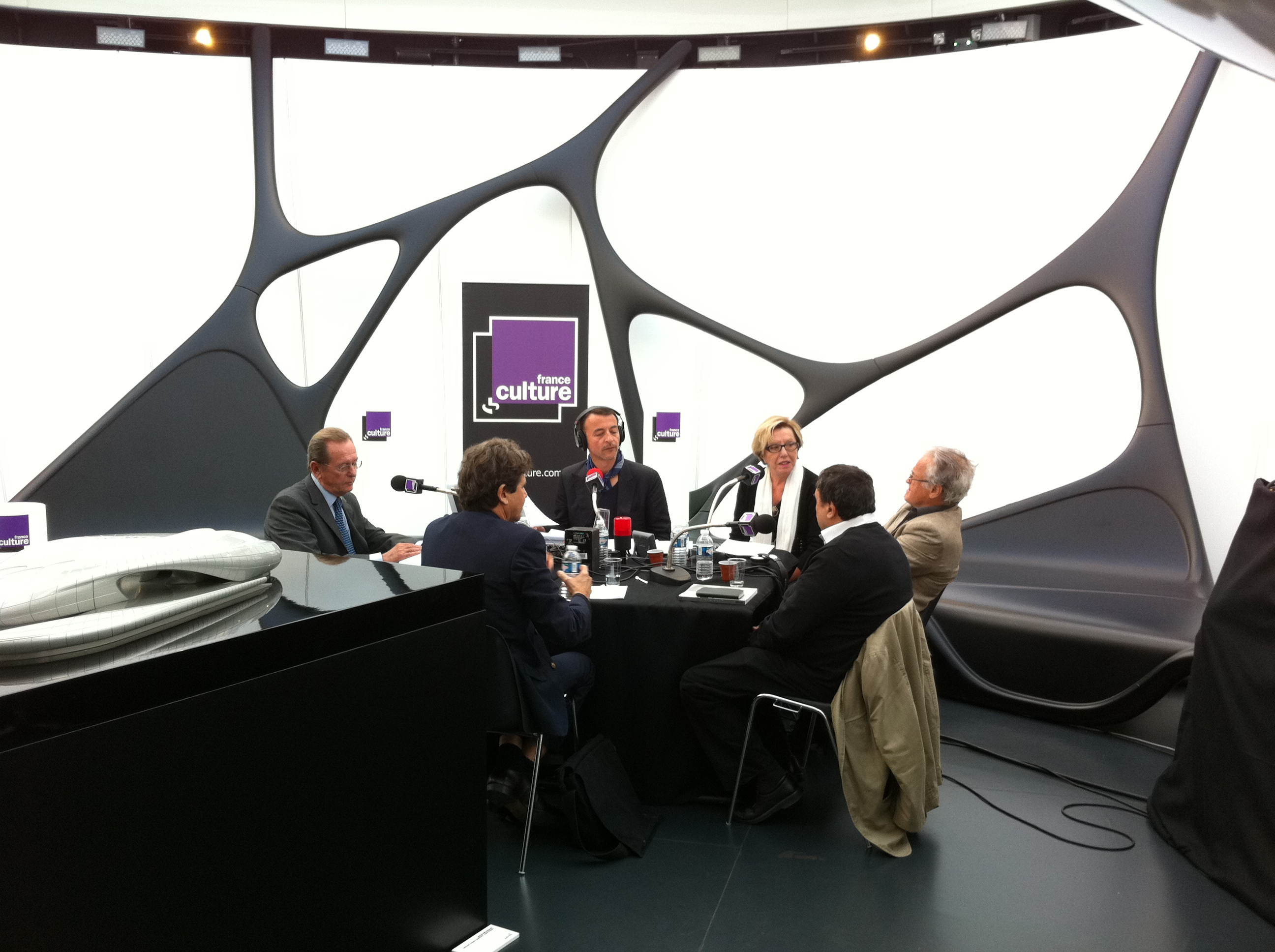 Les Matins de France Culture, le 27 mai 2011, à l'IMA. De gauche à droite : Dominique Baudis, Abdelwahab Meddeb, Marc Voinchet, Danièle Sallenave, Benjamin Stora, Alain-Gérard Slama. Description